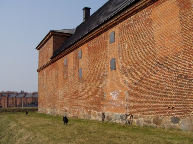 Castle Of Häme in Finland